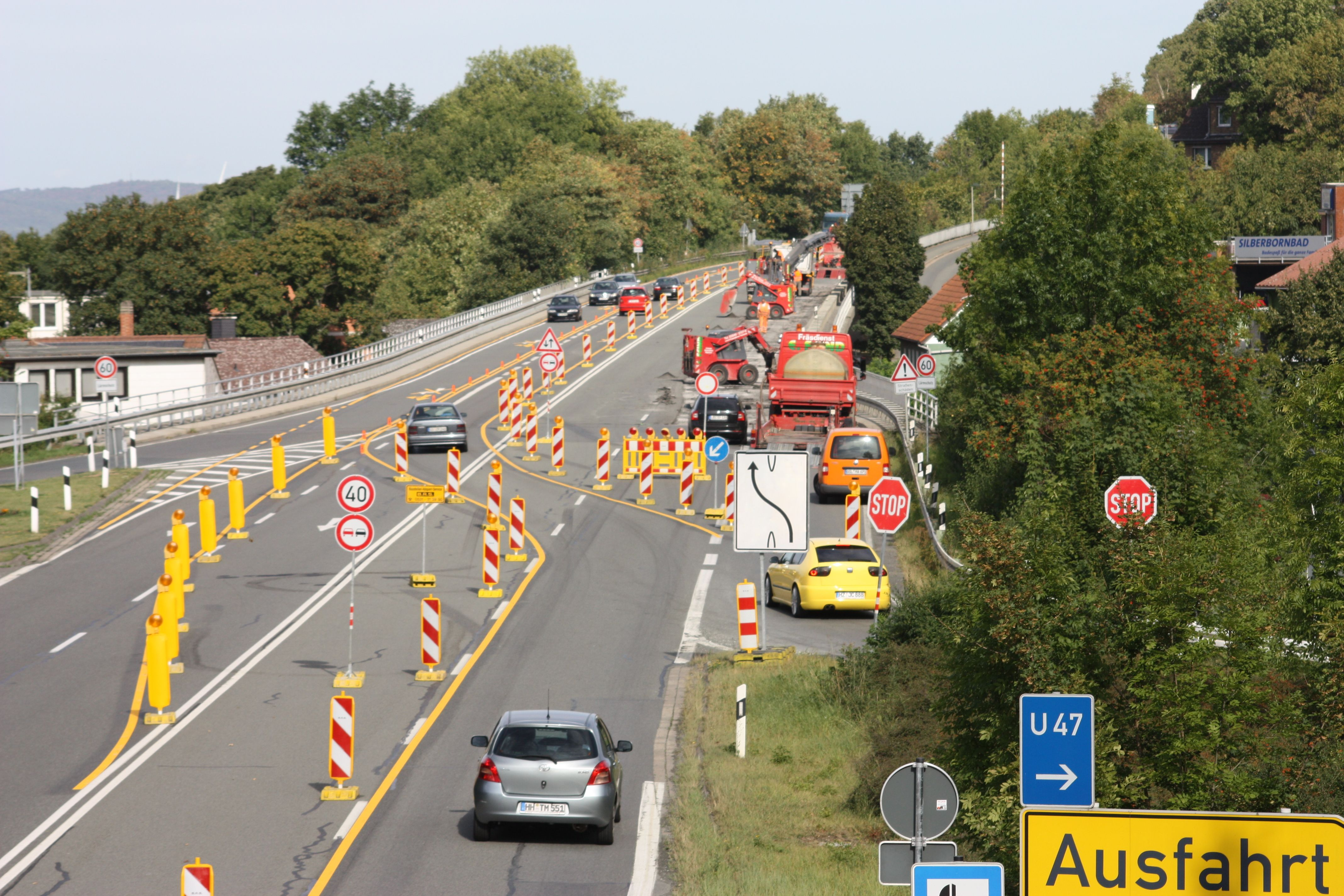 Baustelle Hannover